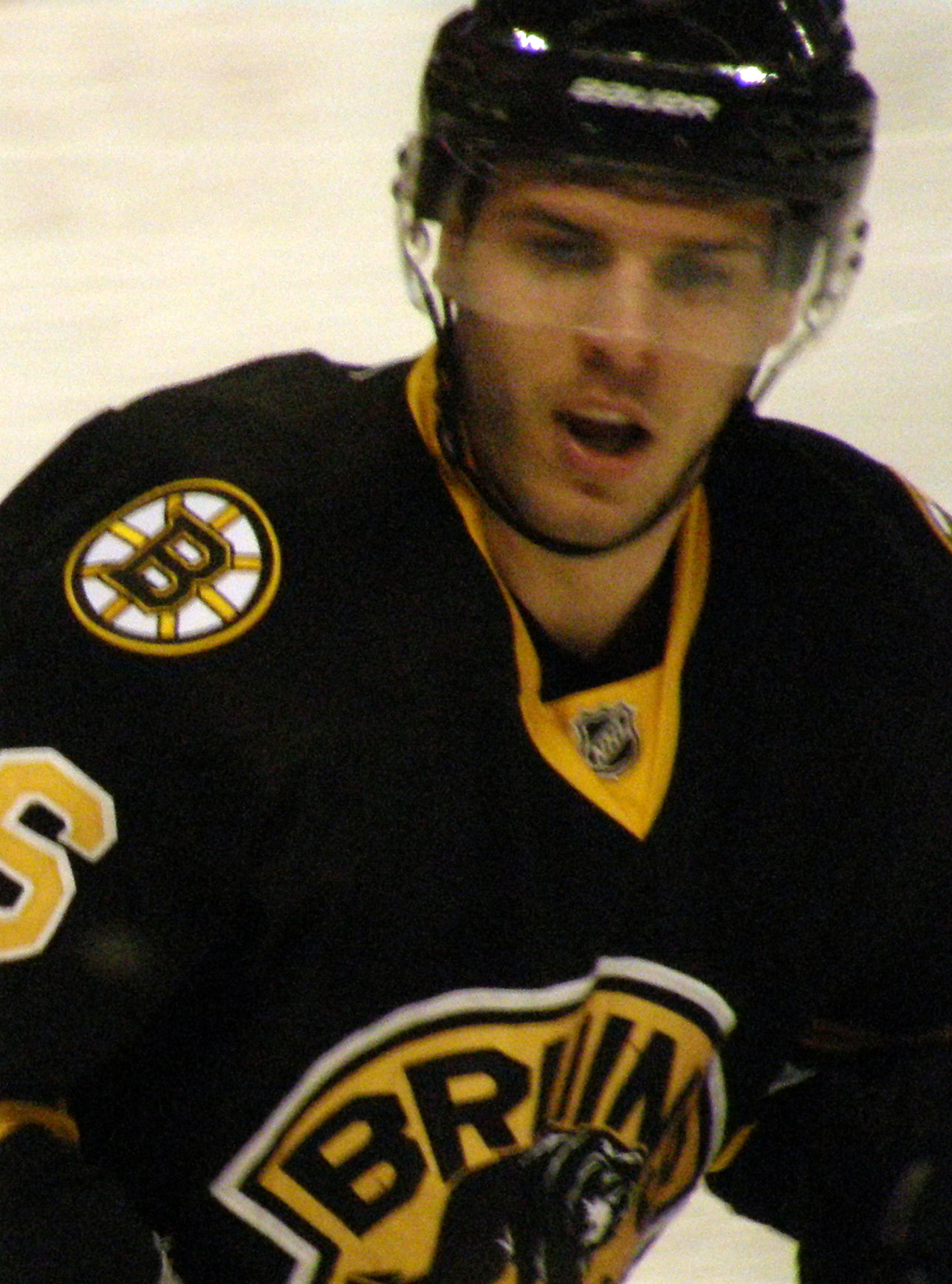 46, David Krejci, C, BOS Pittsburgh Penguins at (vs) Boston Bruins, TD Banknorth Garden (Boston Garden), March 18, 2010